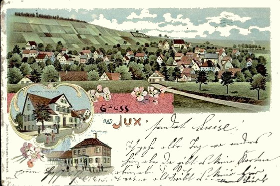 de: Karte von Jux bei Spiegelberg (Baden-Württemberg) 1902 en: Card of Jux at Spiegelberg, Baden-Württemberg, Germany 1902